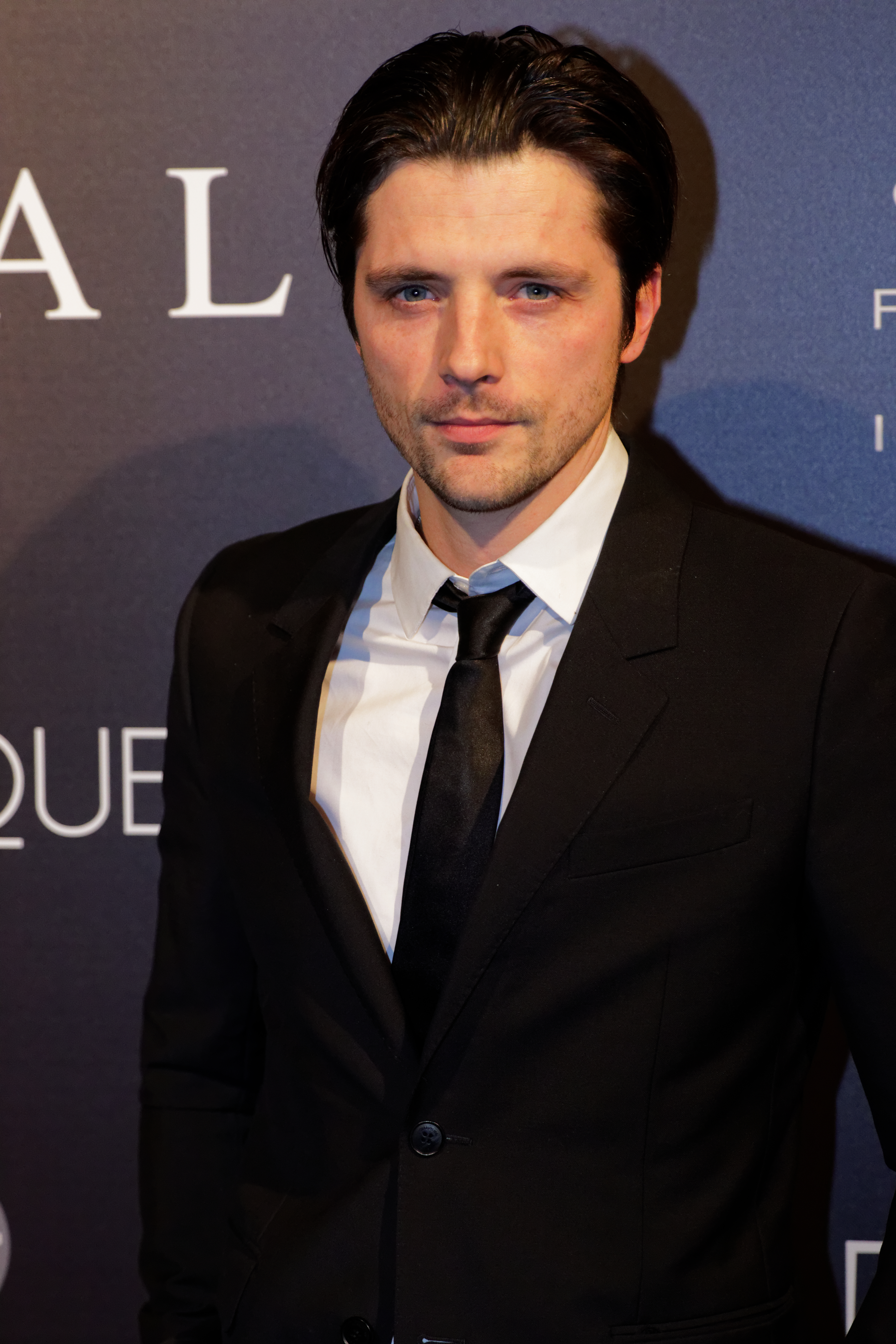 Photocall du festival automobile international 2016.